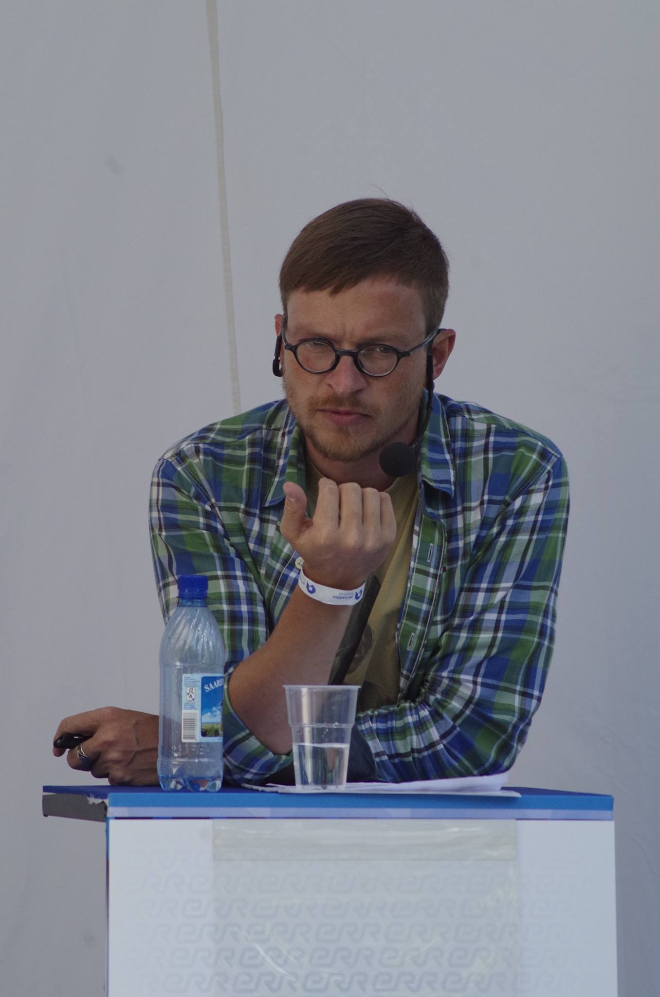 Jüri Muttika